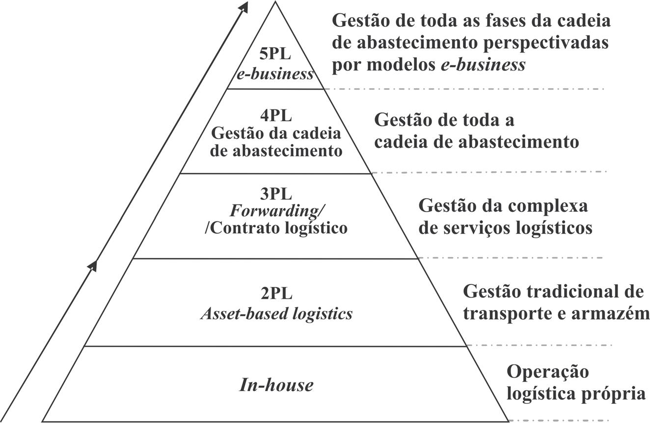 os 5 tipos de PSL. prestador de serviços logísticos